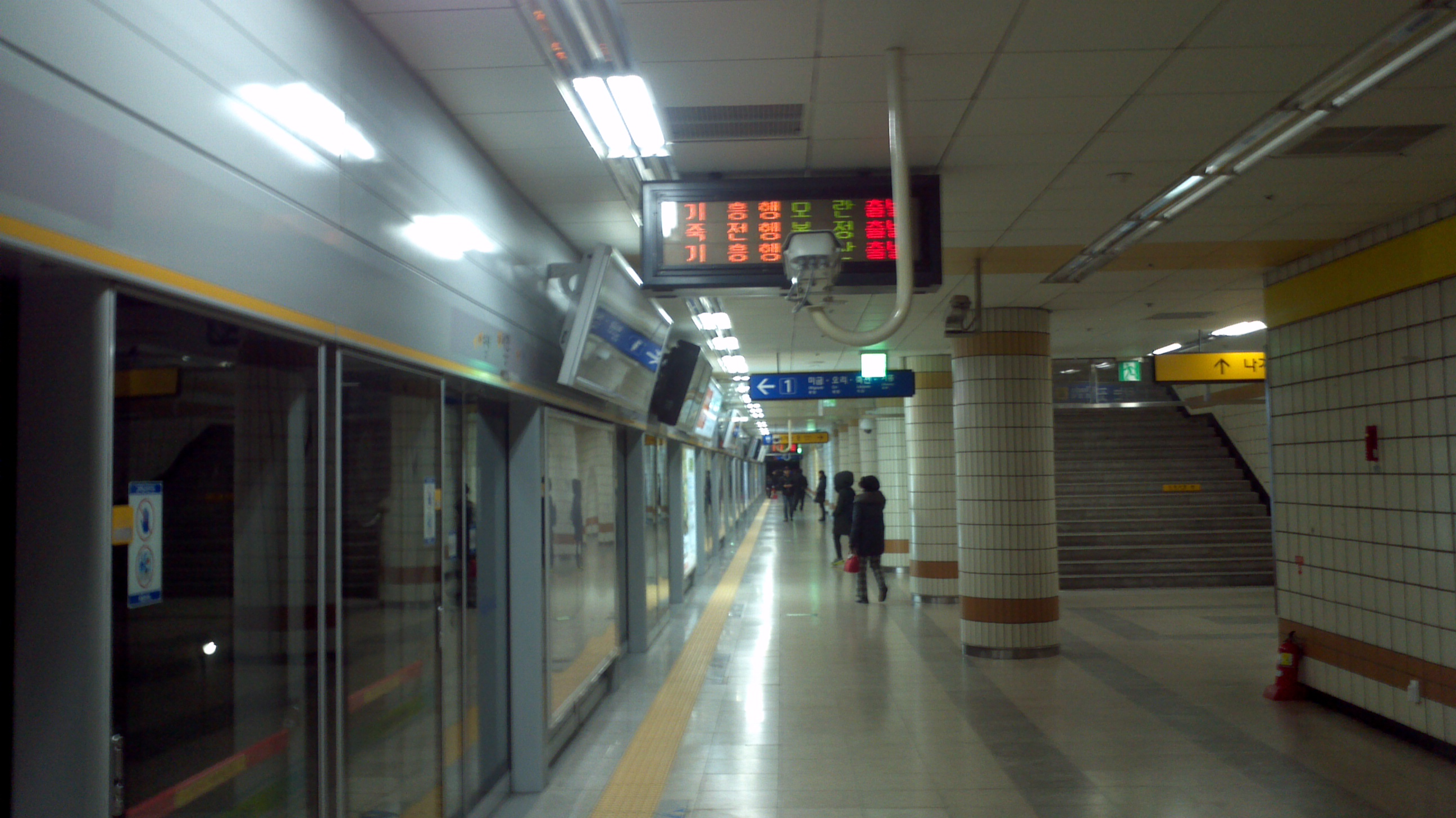 서현역 승강장